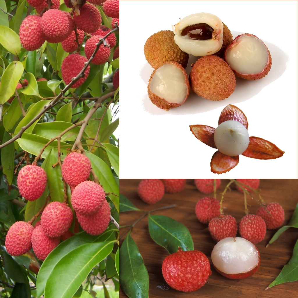 Grafika podręcznika Wikijunior:Owoce. Liczi, śliwka chińska, liczi chińskie (Litchi chinensis).